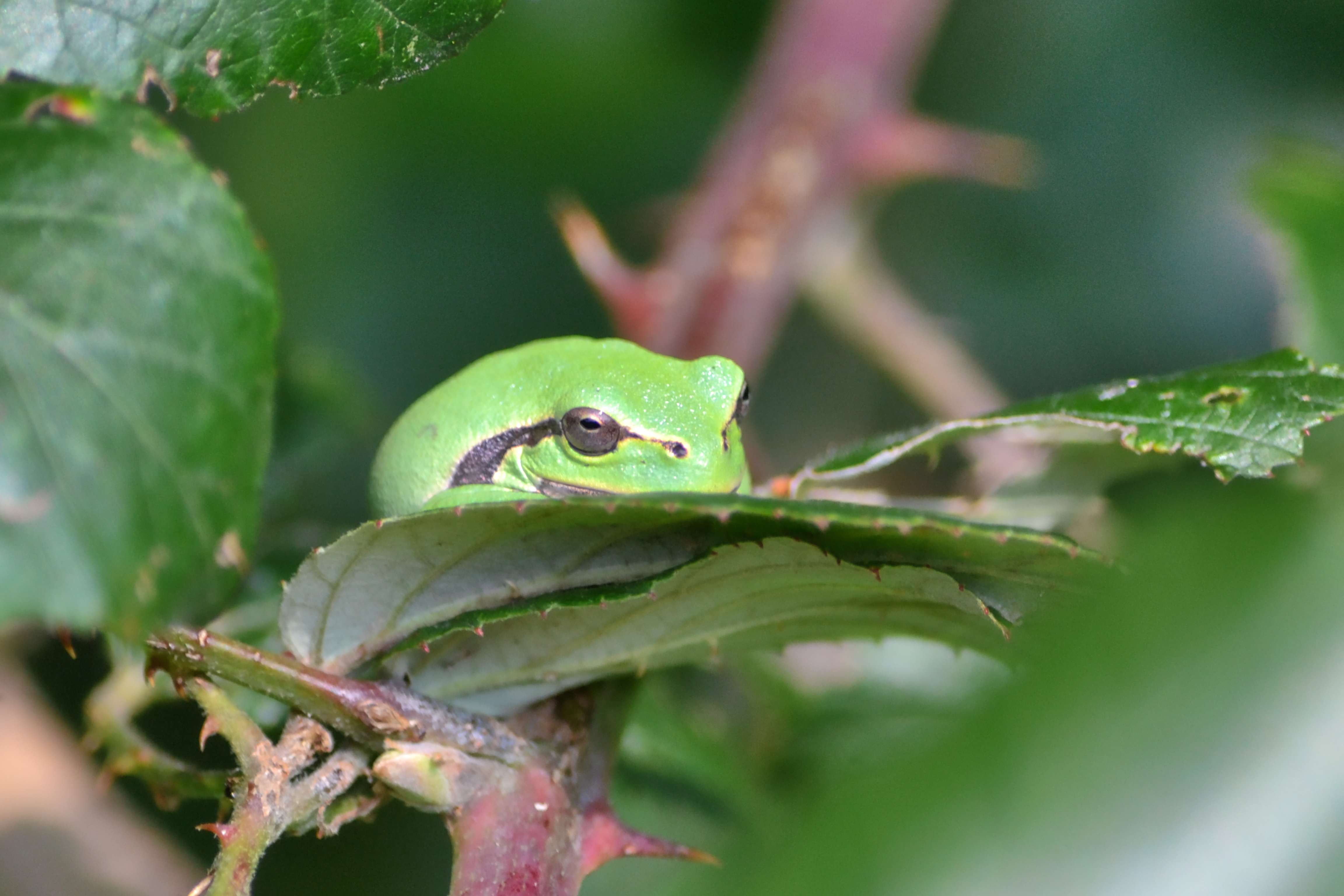 Raganella italiana (Hyla intermedia)